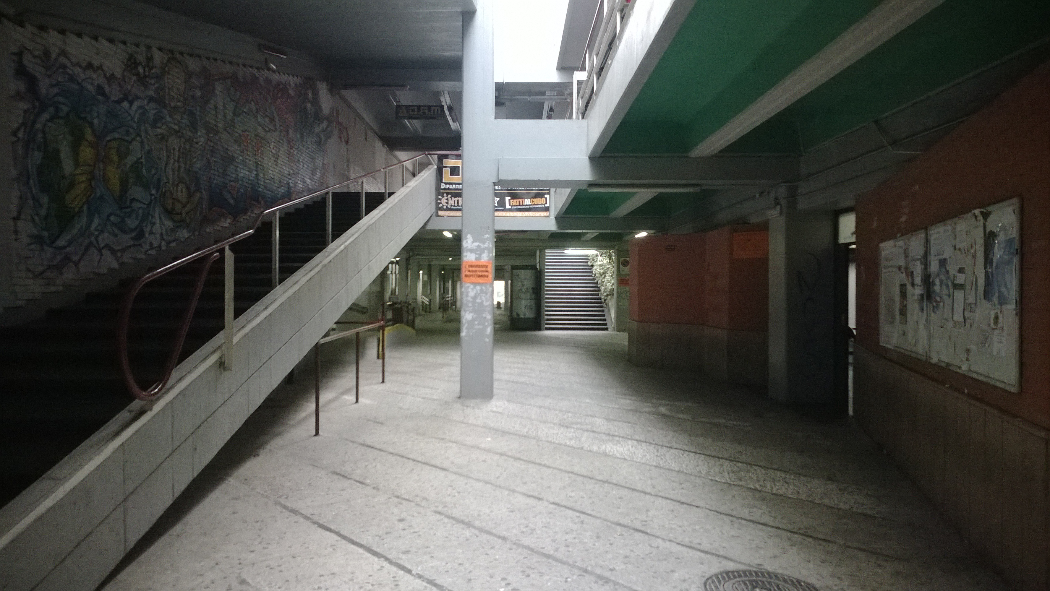 Interno dell'Edificio Polifunzionale: in principio sede dell'Università della Calabria, ora sede del dipartimento di Farmacia e Scienze della Salute e della Nutrizione